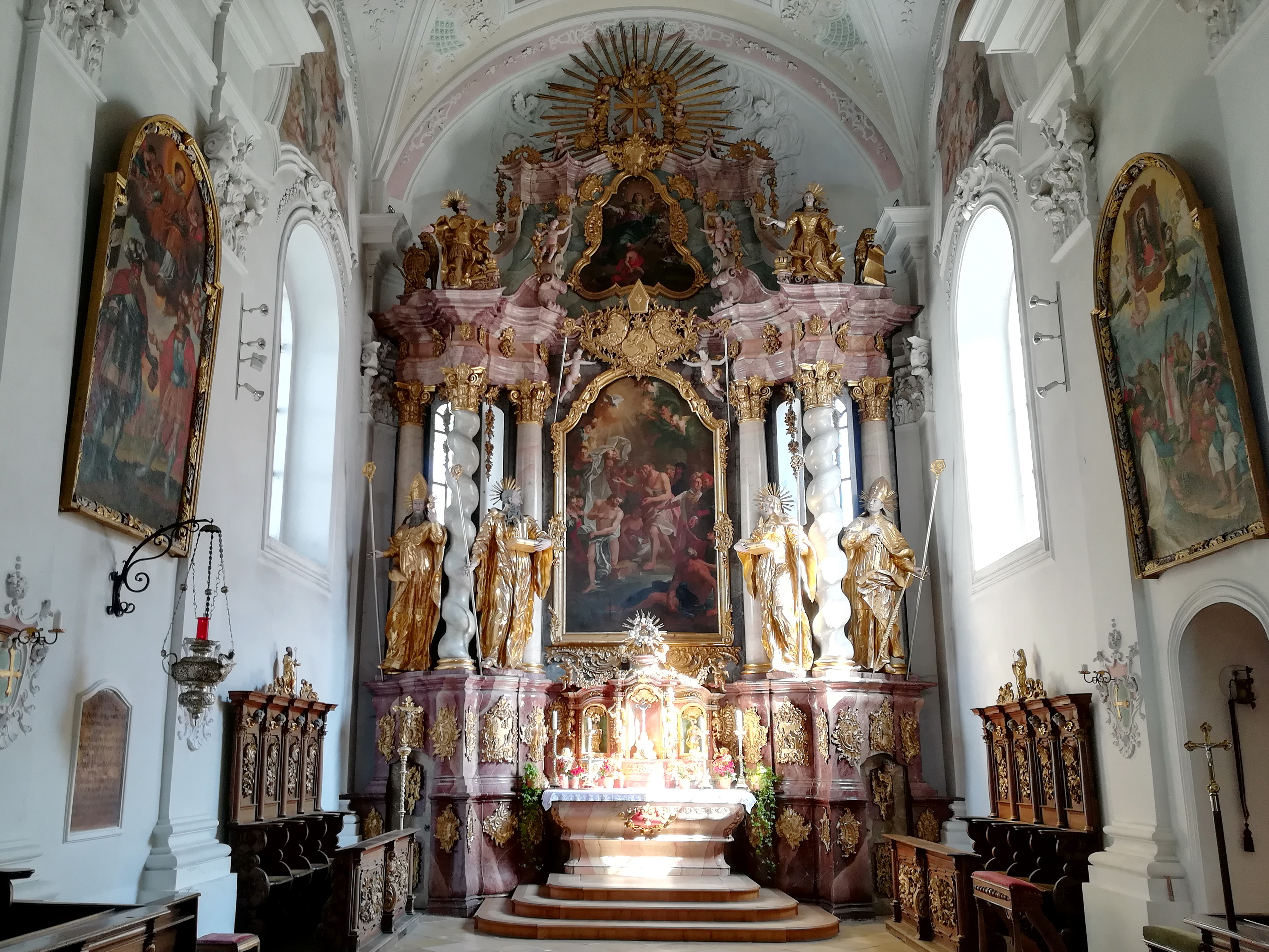 Die ehemalige Klosterkirche und heutige Pfarrkirche in Rinchnach.